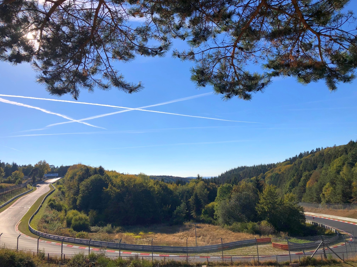 Streckenabschnitt Steilstrecke mit Anfahrt zum Karussell auf der Nordschleife des Nürburgrings